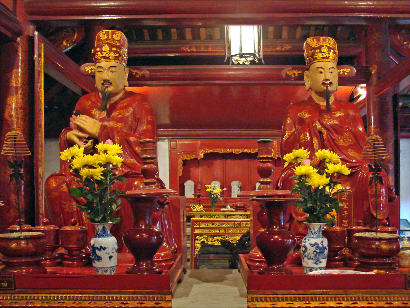 Confucius est né en l'an 551 avant notre ère, à Qufu, en Chine. Il a fait l'objet d'un culte à titre posthume, jusqu'à être nommé "Dieu Suprême" en Chine. Plusieurs temples lui sont consacrés, dans les grandes villes chinoises et d'Extrême-Orient, sur le modèle de celui de Qufu. Le confucianisme a eu un fort impact sur la culture, la psychologie et l'éthique des chinois et d'autres peuples des pays voisins, y compris au Vietnam. Confucius a été honoré comme “l'Enseignant de dix mille générations”. Le Temple de la littérature à Hanoi a été érigé en 1070 par les souverains Ly sur ce modèle. Une Académie nationale a été ajoutée au Temple en 1076. Elle a été transformée en Collège National qui est resté à Hanoi jusqu'en 1807 où il a été transféré à Hué. En partie détruit par la Guerre, le Temple a été reconstruit en 1954.